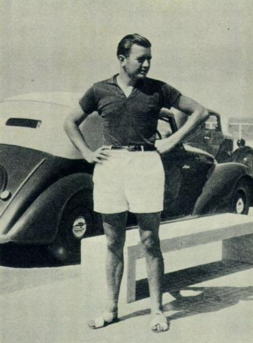 Il figlio del Duce, Bruno Mussolini, a Riccione nel 1939.